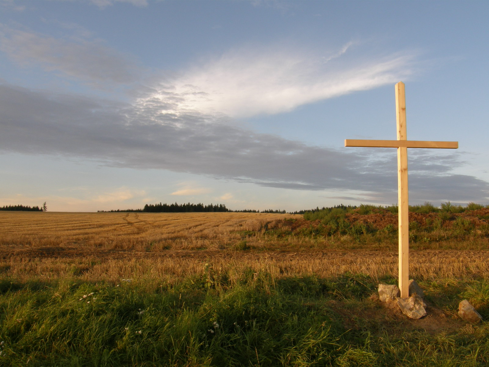 Dřevěný kříž při západu.